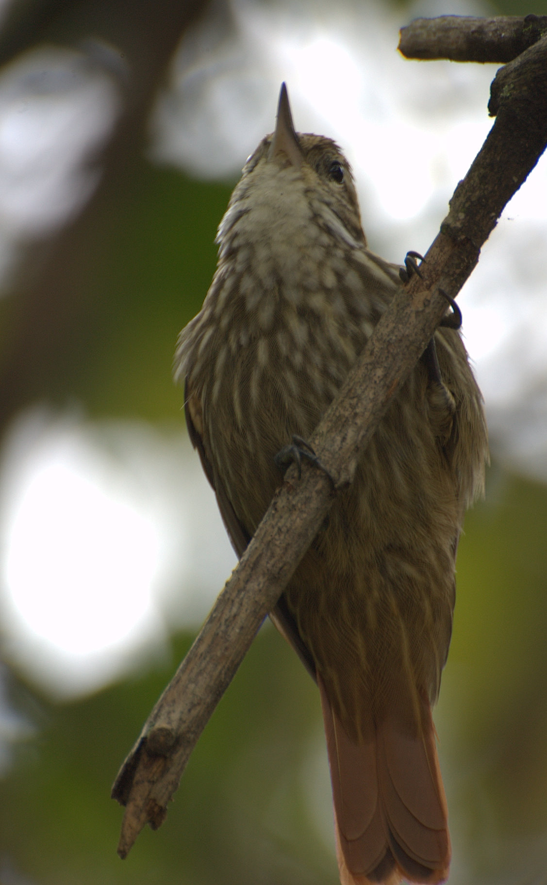 Horto Florestal de São Paulo